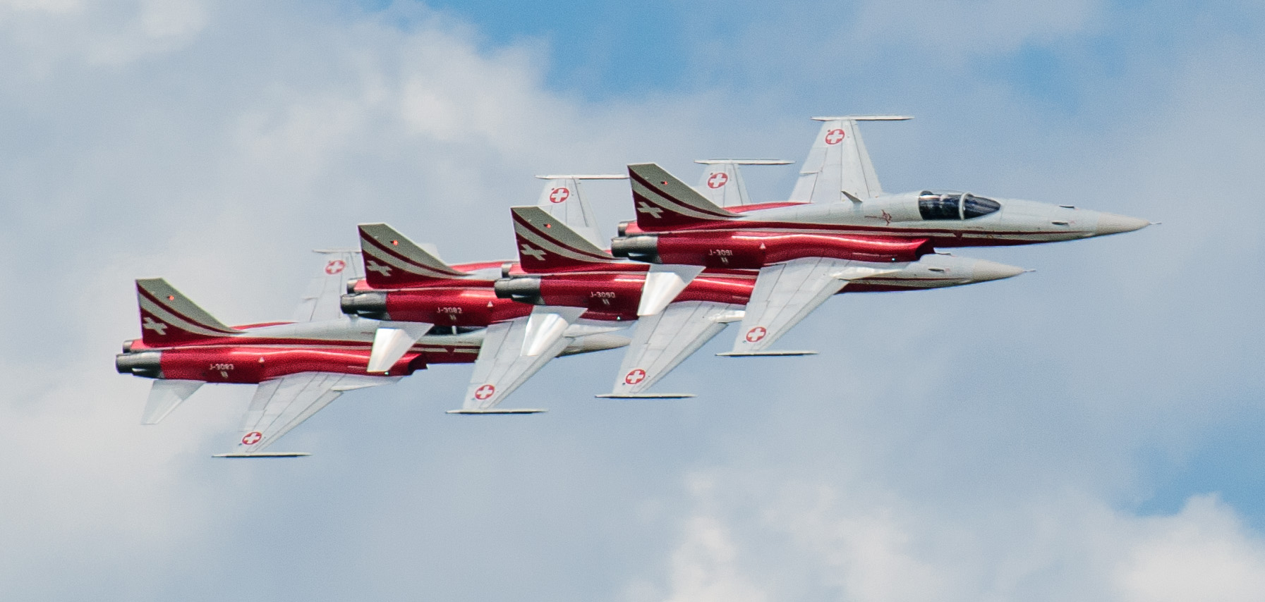 Patrouille Suisse NL Air Force Days